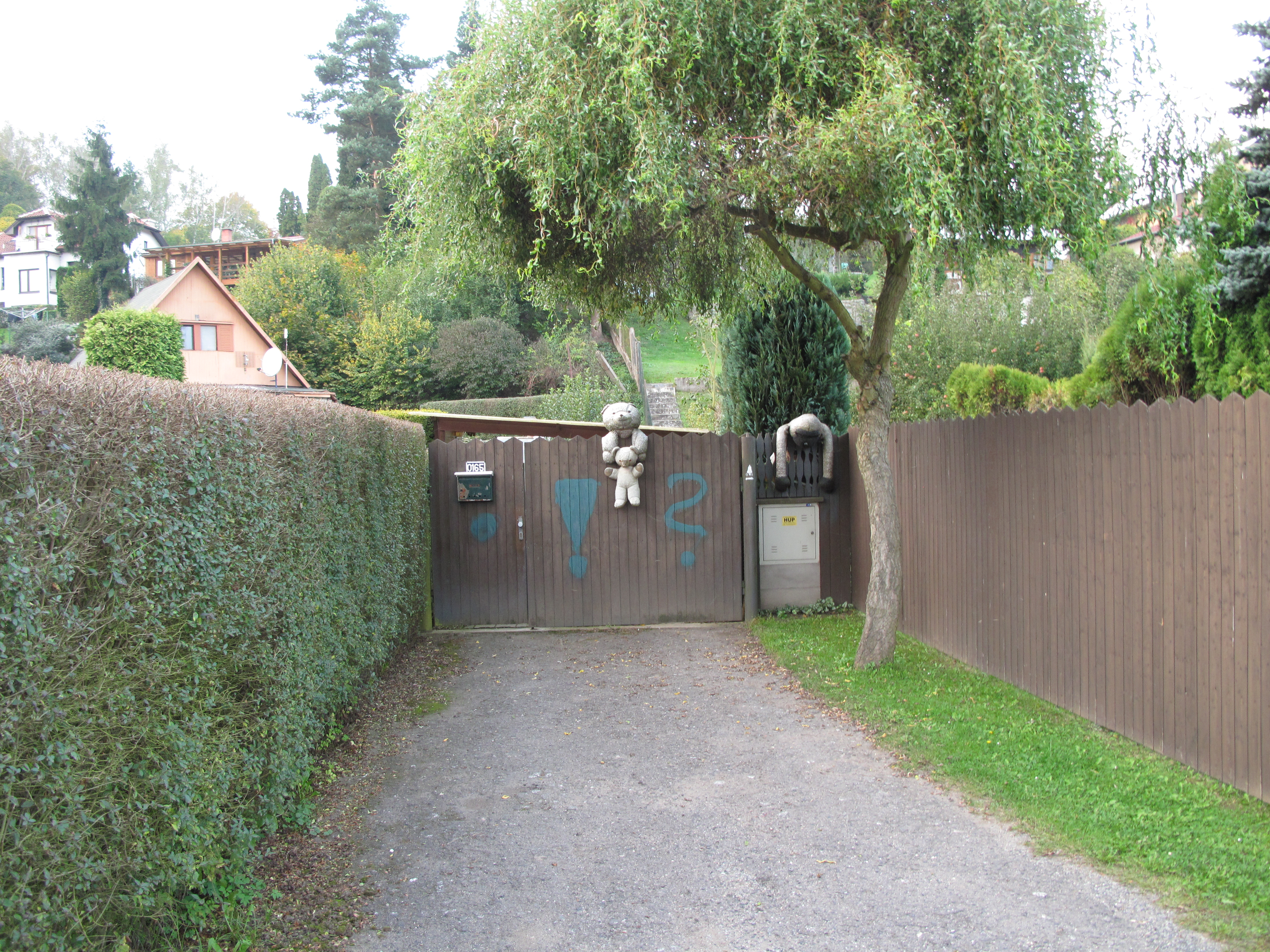 Brána v Javorníku. Okres Benešov, Česká republika.